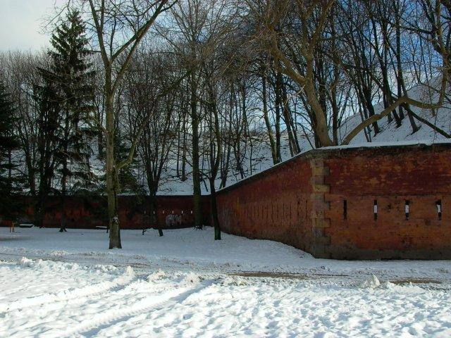 Zdjęcie przedstawiające mur Carnota u podnóża prawego barku IV bastionu Cytadeli Aleksandrowskiej (Warszawskiej). Autor: Zbigniew Strucki , 30.I.2007